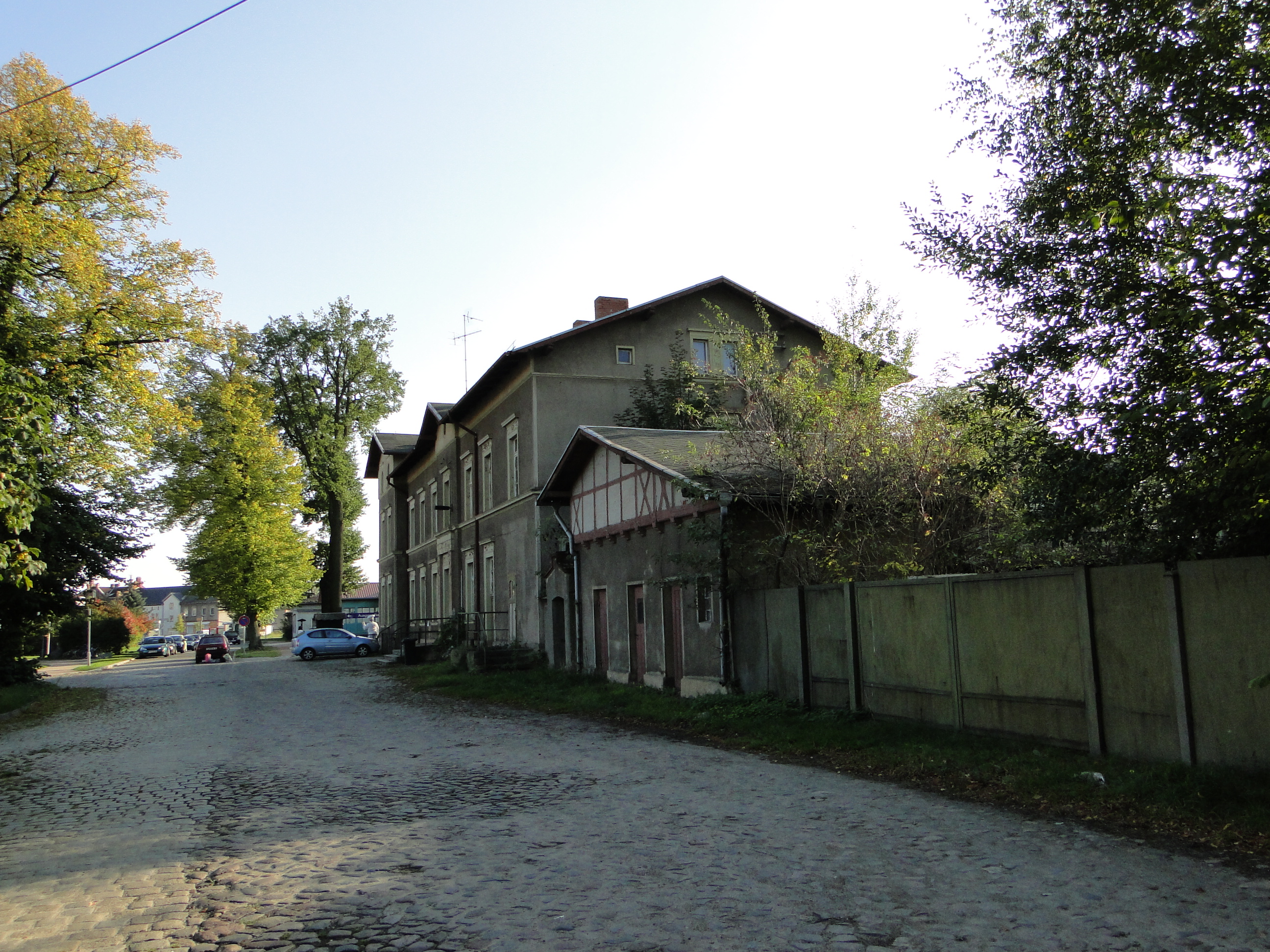 Bahnhof - Karstädt, Prignitz